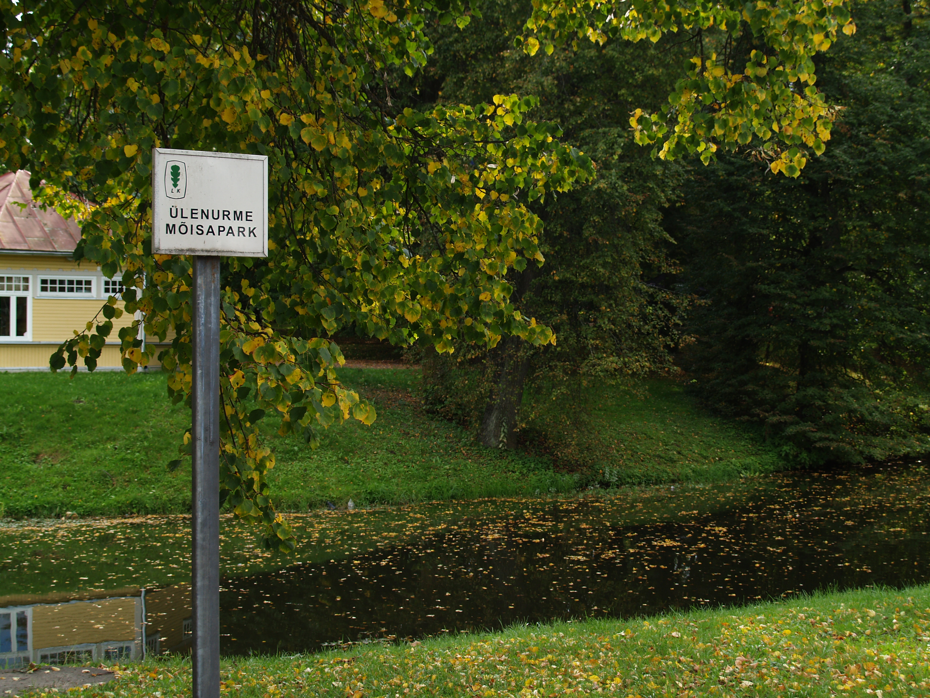 Ülenurme mõisapark